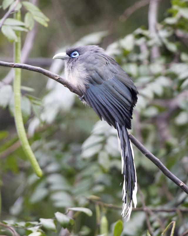 Blue-faced Malkoha Phaenicophaeus viridirostris, Kandalama, Sri Lanka, elevation: 200m.